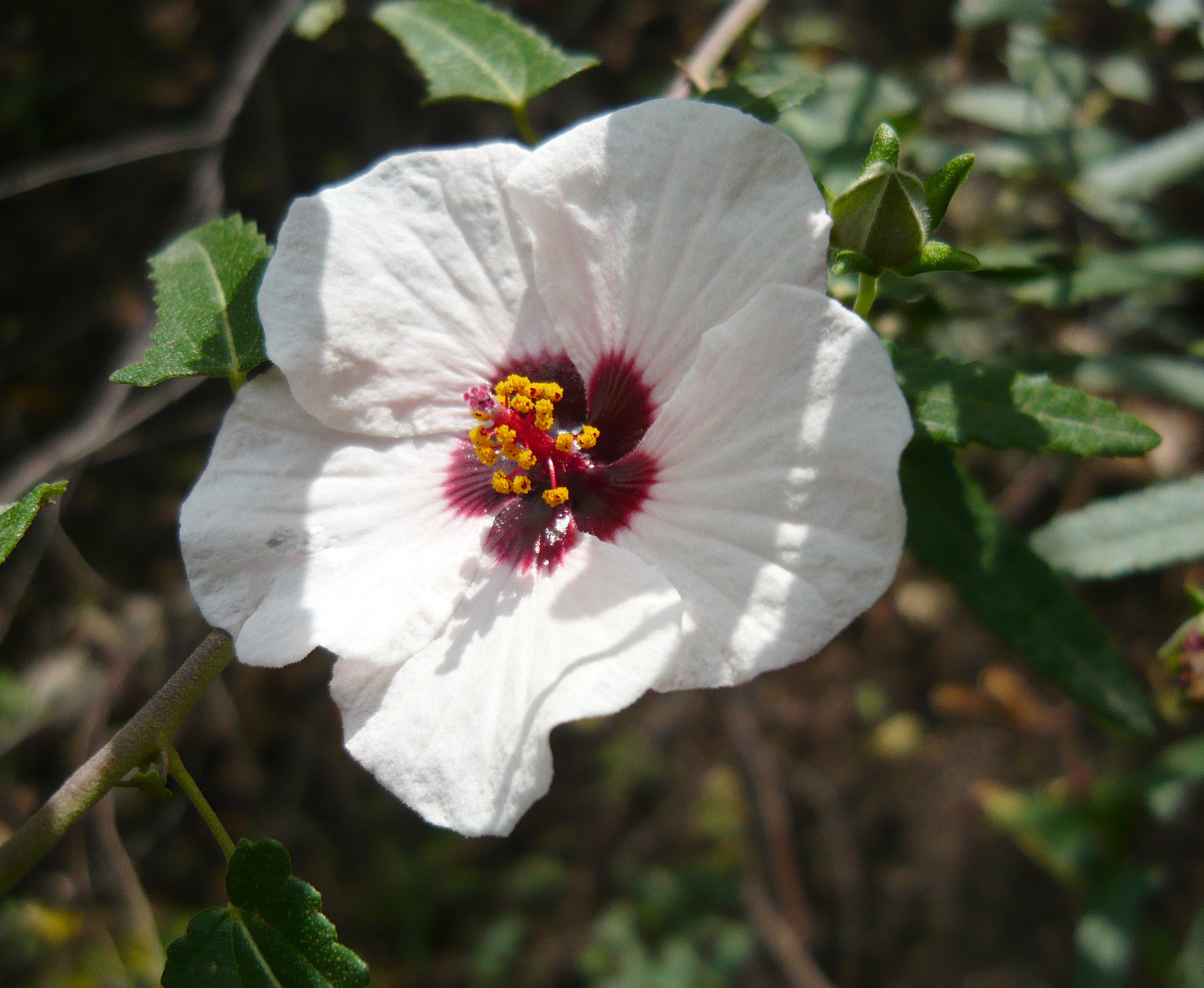 Pavonia hastata. Real Jardín Botánico de Madrid